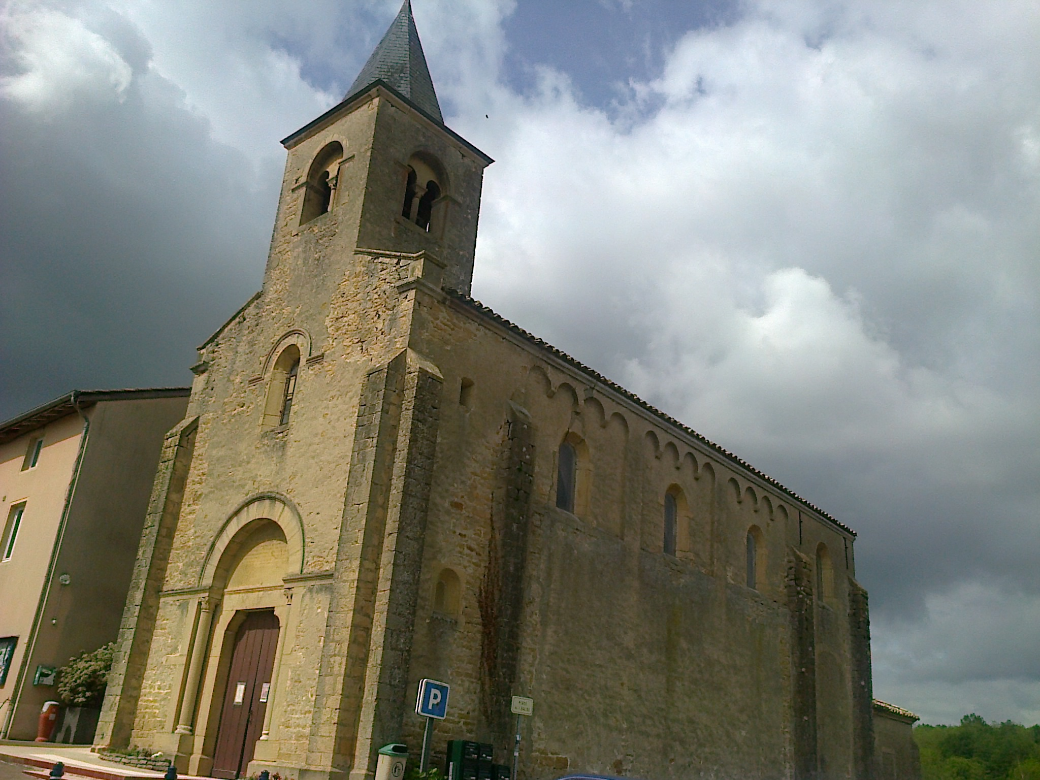 Charbonnières